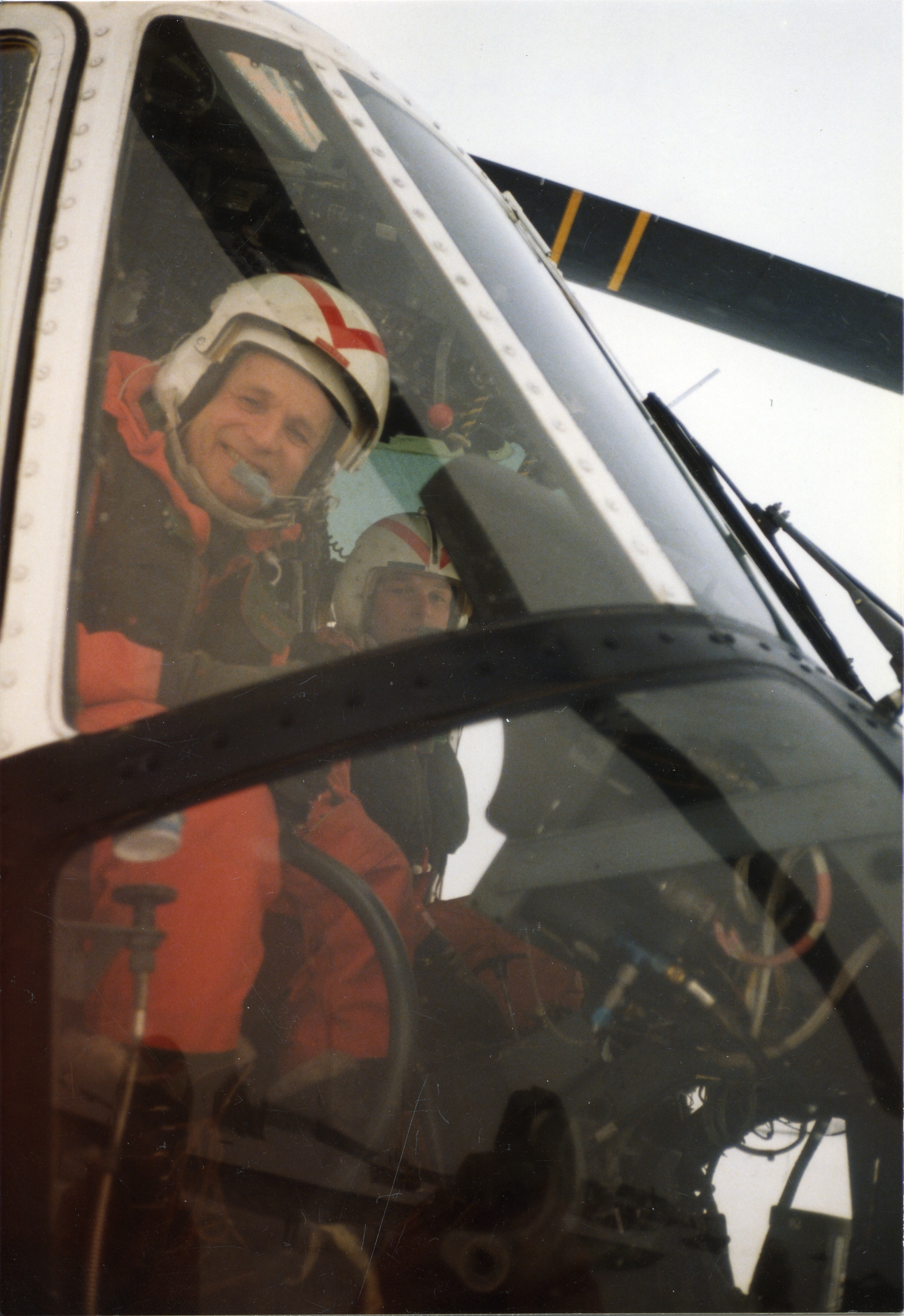 Major Jens Holter i en Sea King på Kingsbay, Svalbard